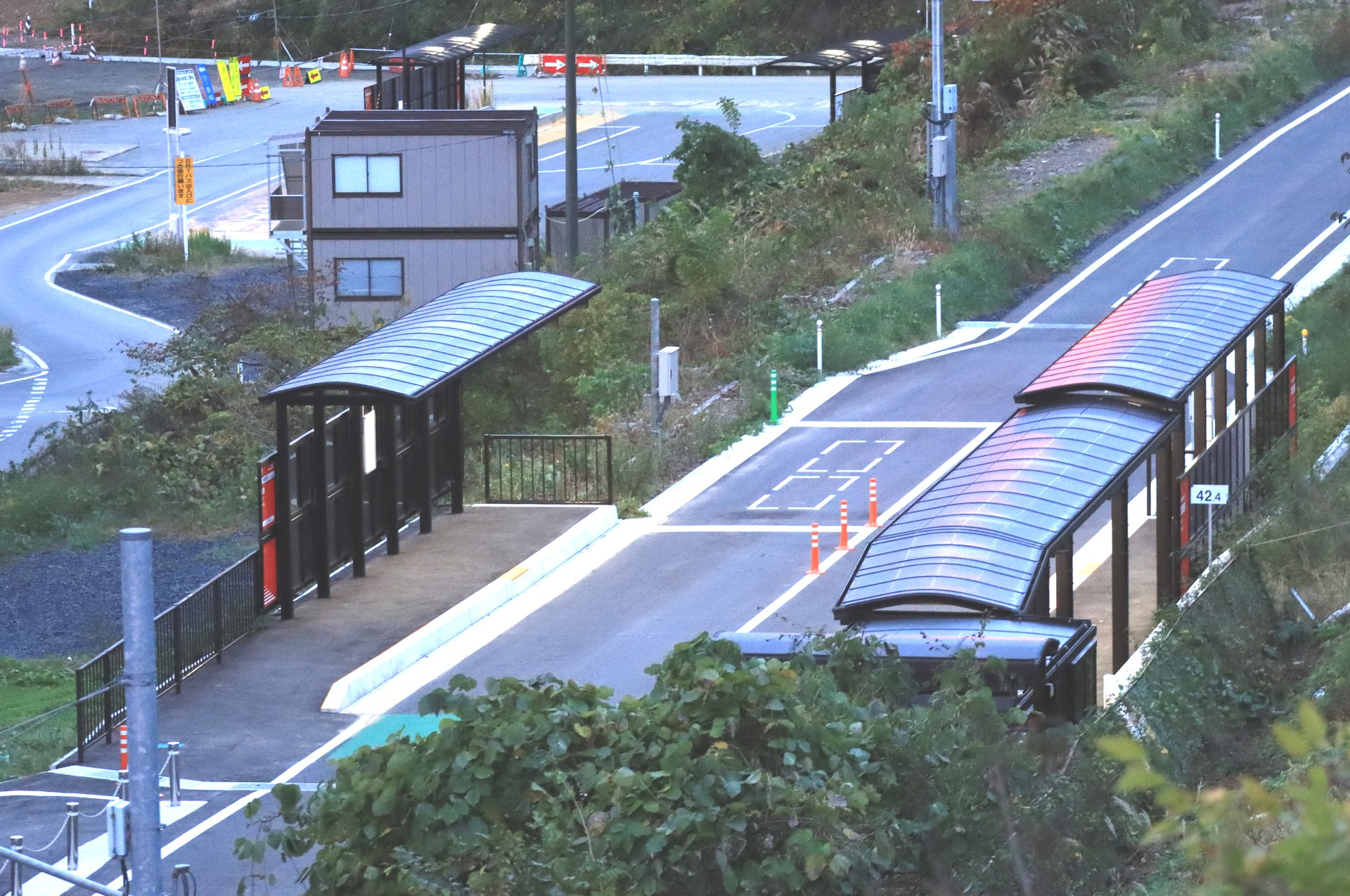 宮城県南三陸町に所在する、JR東日本・気仙沼線BRTの歌津駅